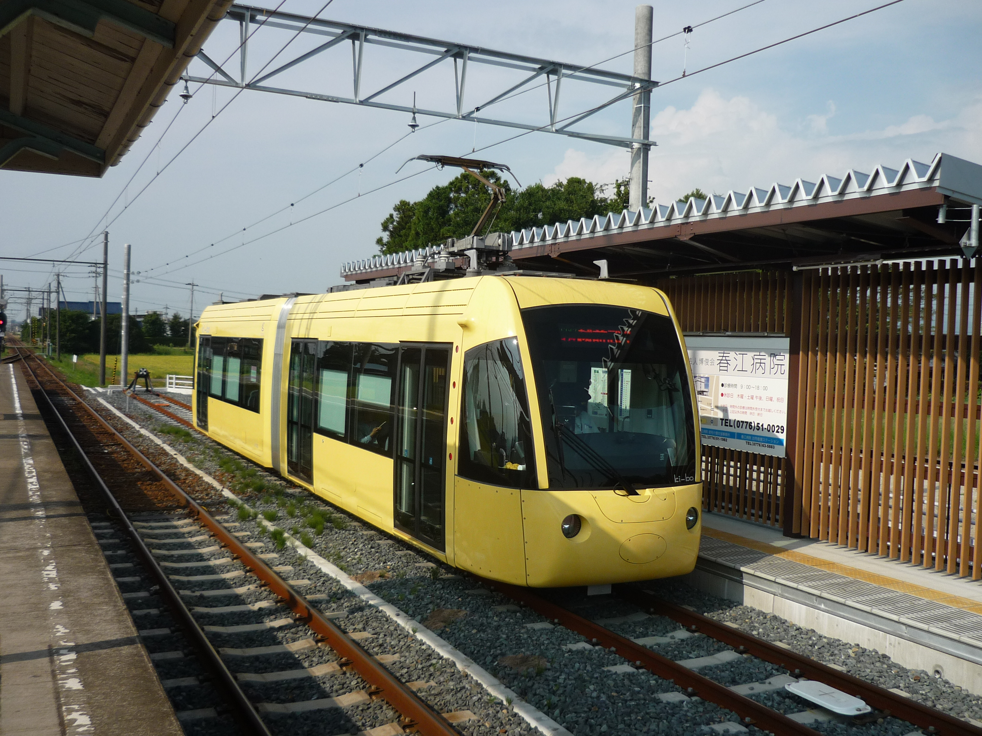 鷲塚針原駅低床ホームに停車中のえちぜん鉄道L形電車（2016年8月）